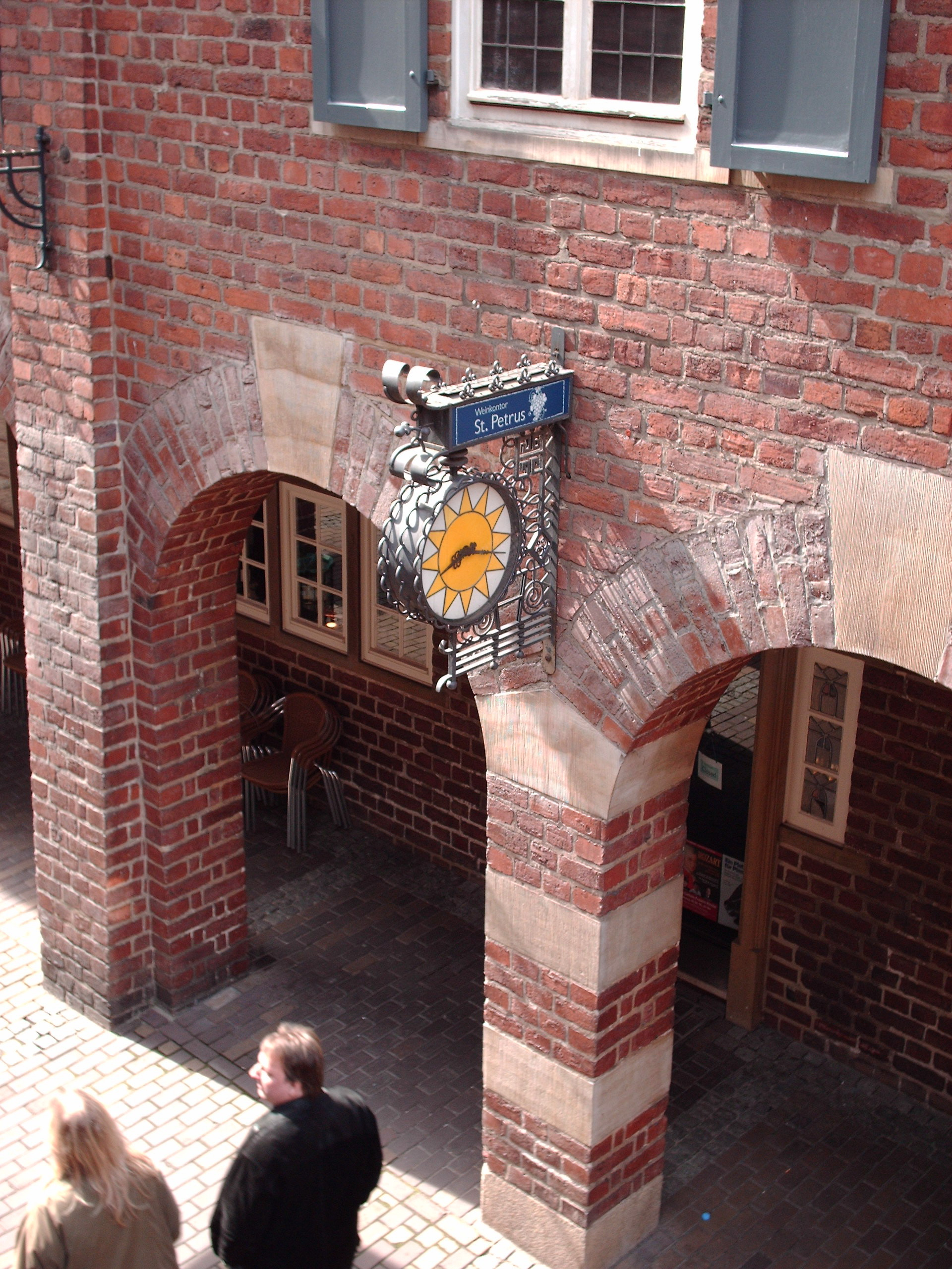 DE: Böttcherstraße - EN: Boettcher Street 1904 Bremen